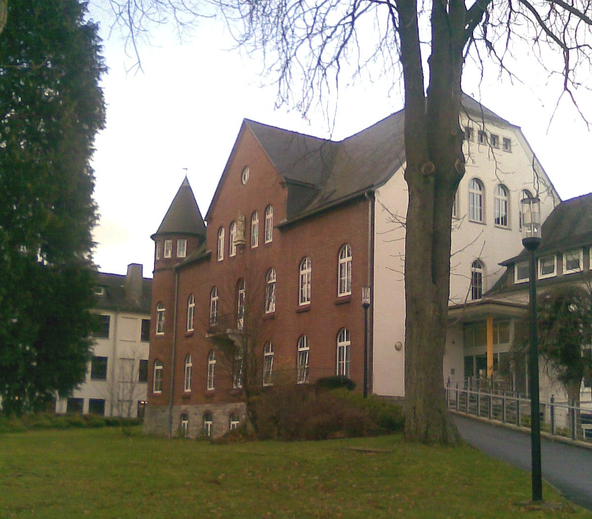 Eingang Josefsheim in Olsberg (Germany)